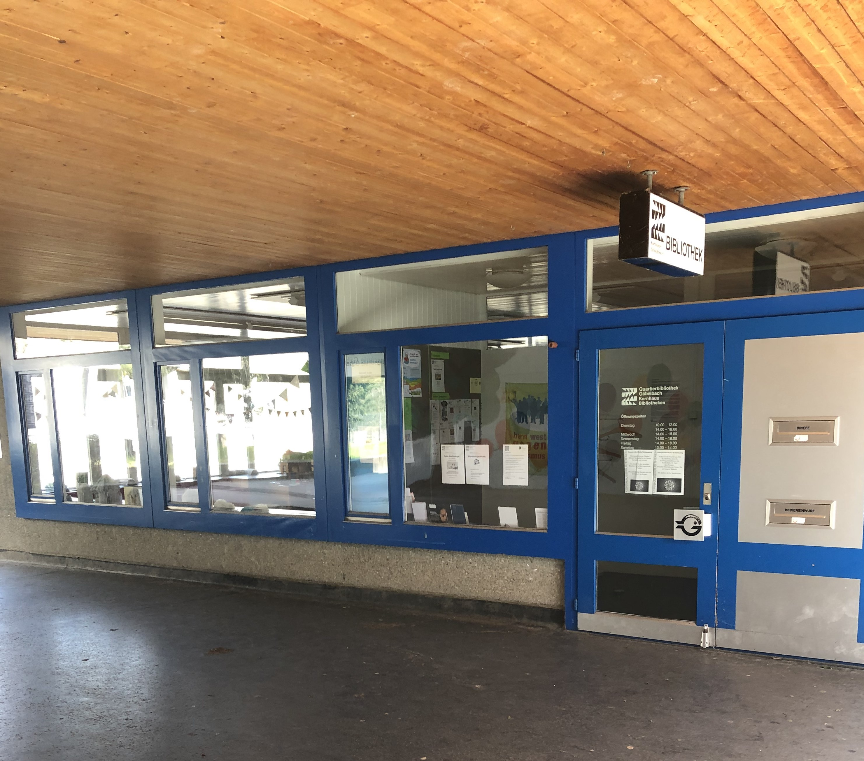 Gäbelbach:Bibliothek